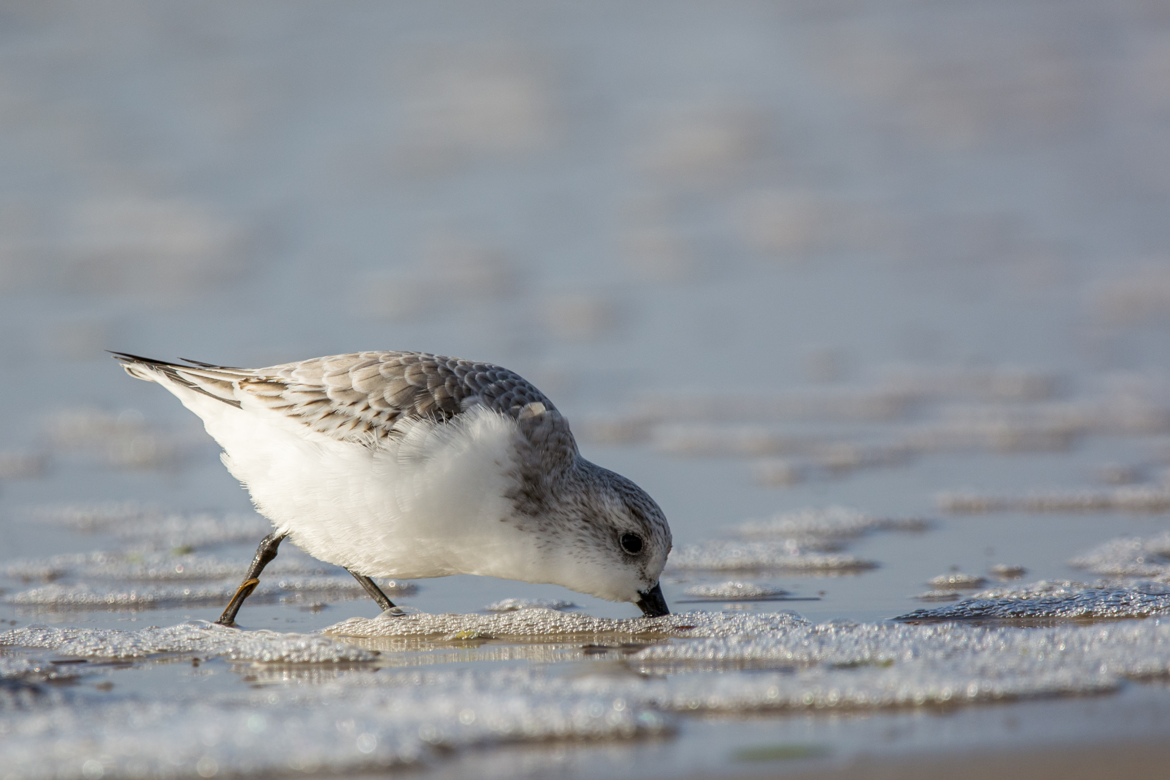 fressender Sanderling auf Spiekeroog - Nationalpark niedersächsisches Wattenmeer